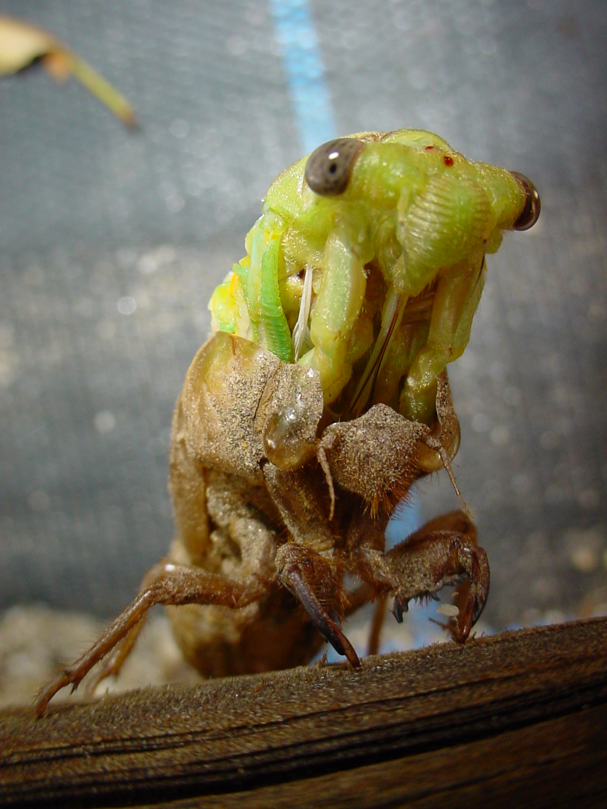 Exuvia de Chicharra